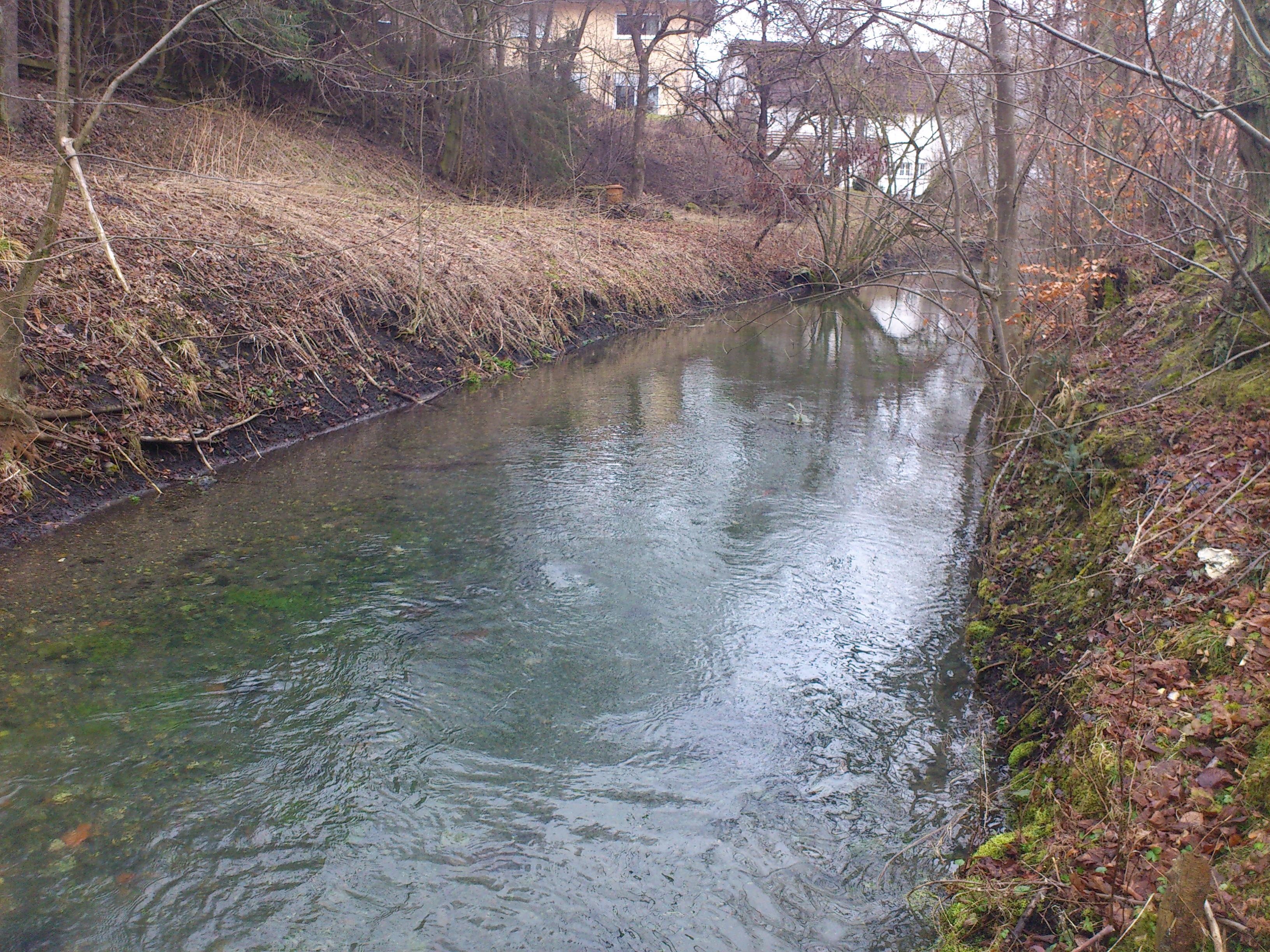 Der Pfeffer nach seiner Quelle